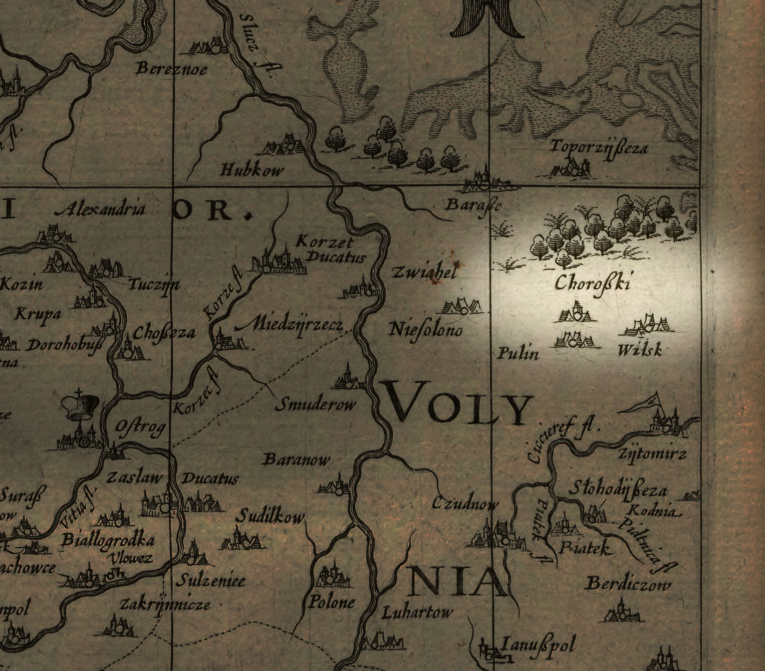 Фраґмент мапи Томаша Маковського, на якій зображене поселення Горошки, для історичного розділу у статті про містечко Хорошів